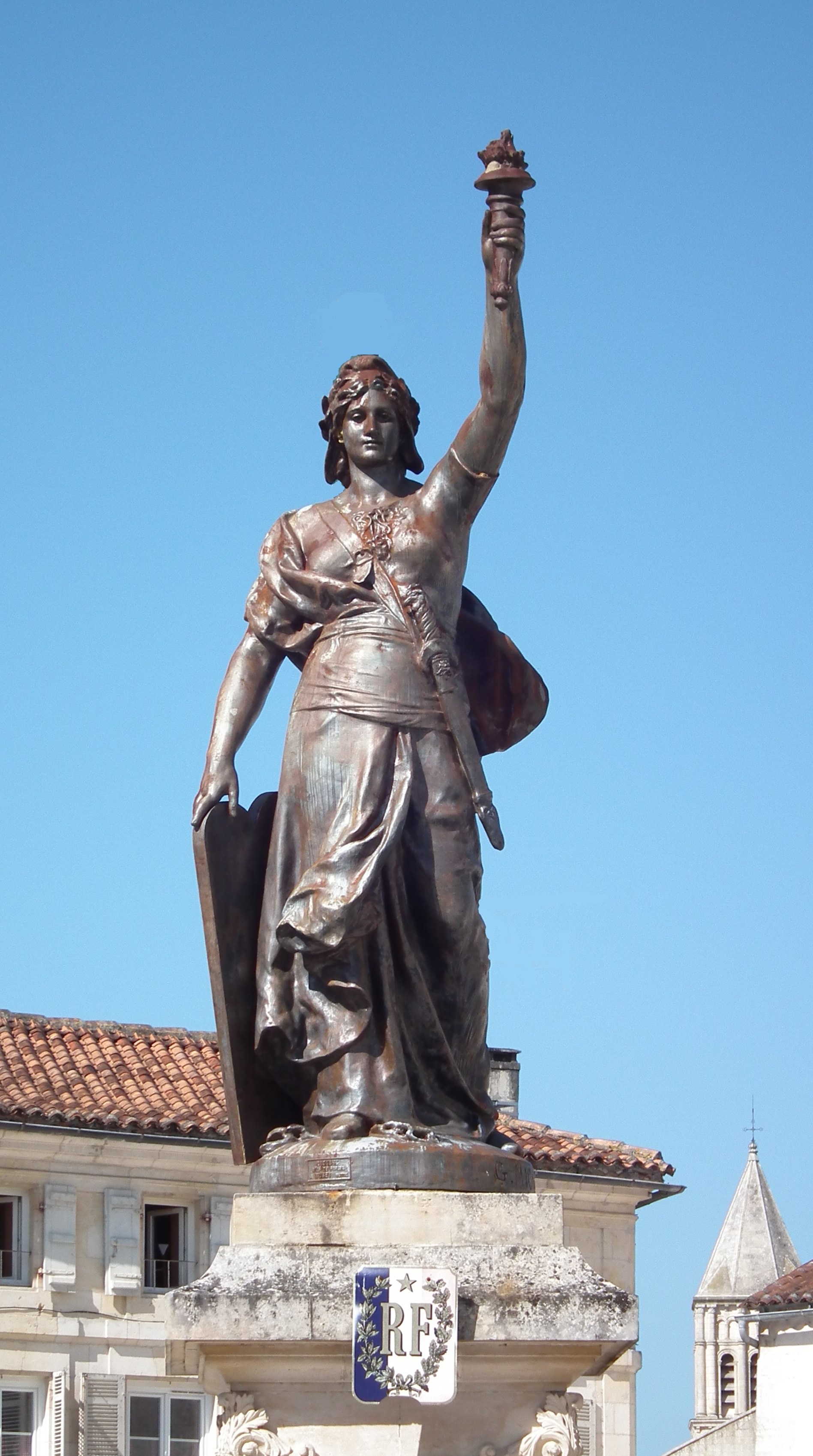 Statue de la République à Jonzac